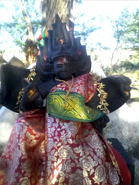 காளியம்மனின் திரு உருவசிலை